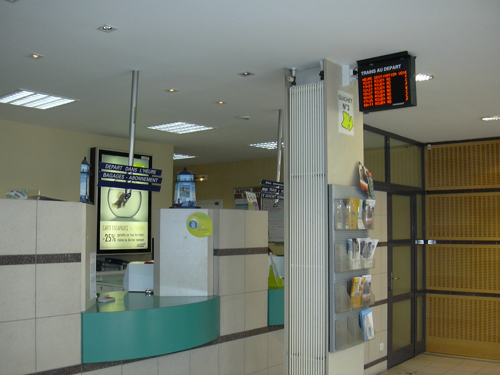 Affichette à LED installée à l'espace de vente de la gare de Dieppe